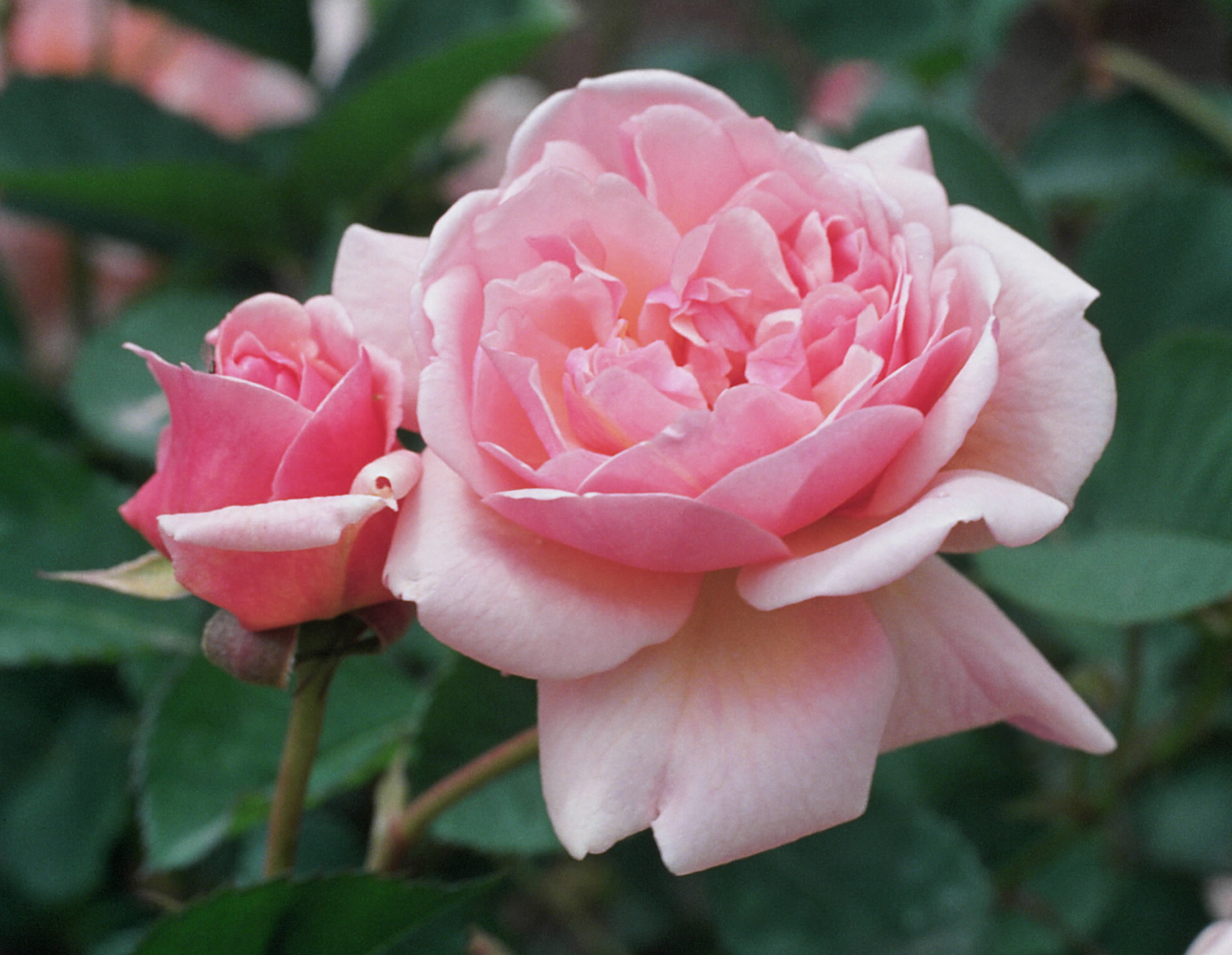 Rosa 'Felicia', hybr. Moschata, sect. Synstylae. Real Jardín Botánico, Madrid